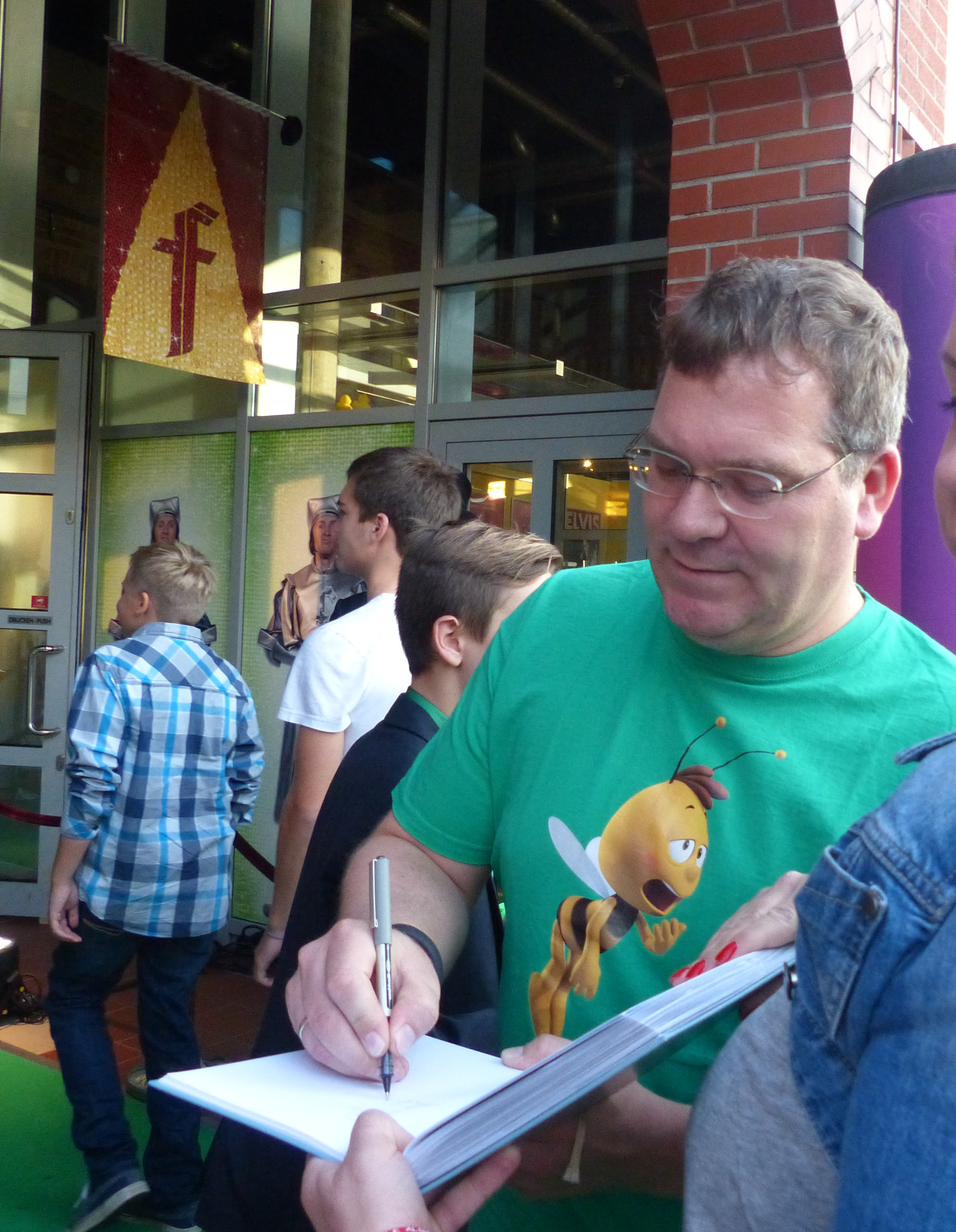 Elton bei der Shrek - Das Musical Premiere, 19.10.'14, Düsseldorf